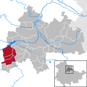 Verwaltungsgemeinschaft Gera-Aue in Thuringia - District Sömmerda